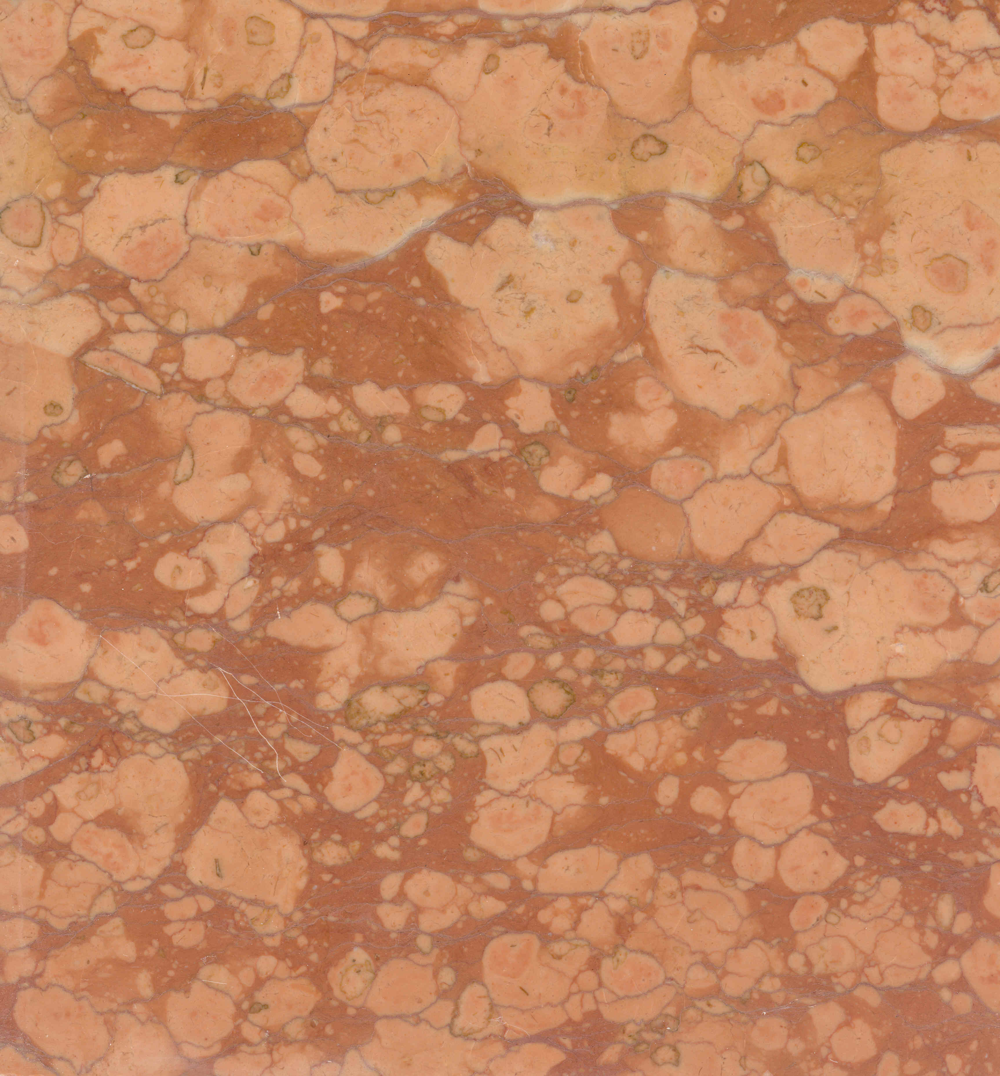 Rosso Verona, Knollenkalk, Italien